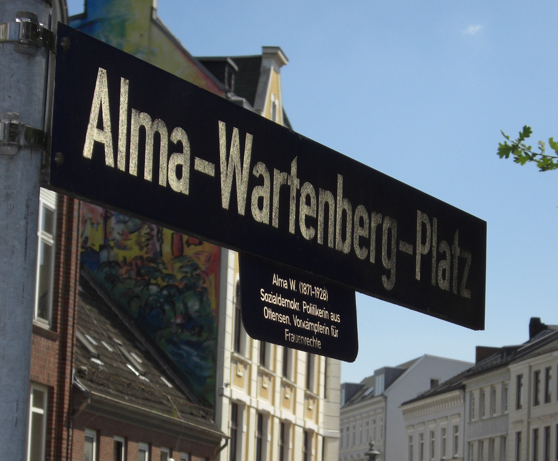 Alma-Wartenberg-Platz in Hamburg-Ottensen